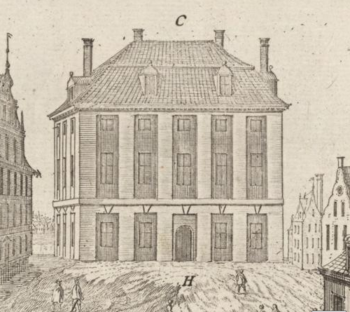 Douglaska palatset (beskuren)